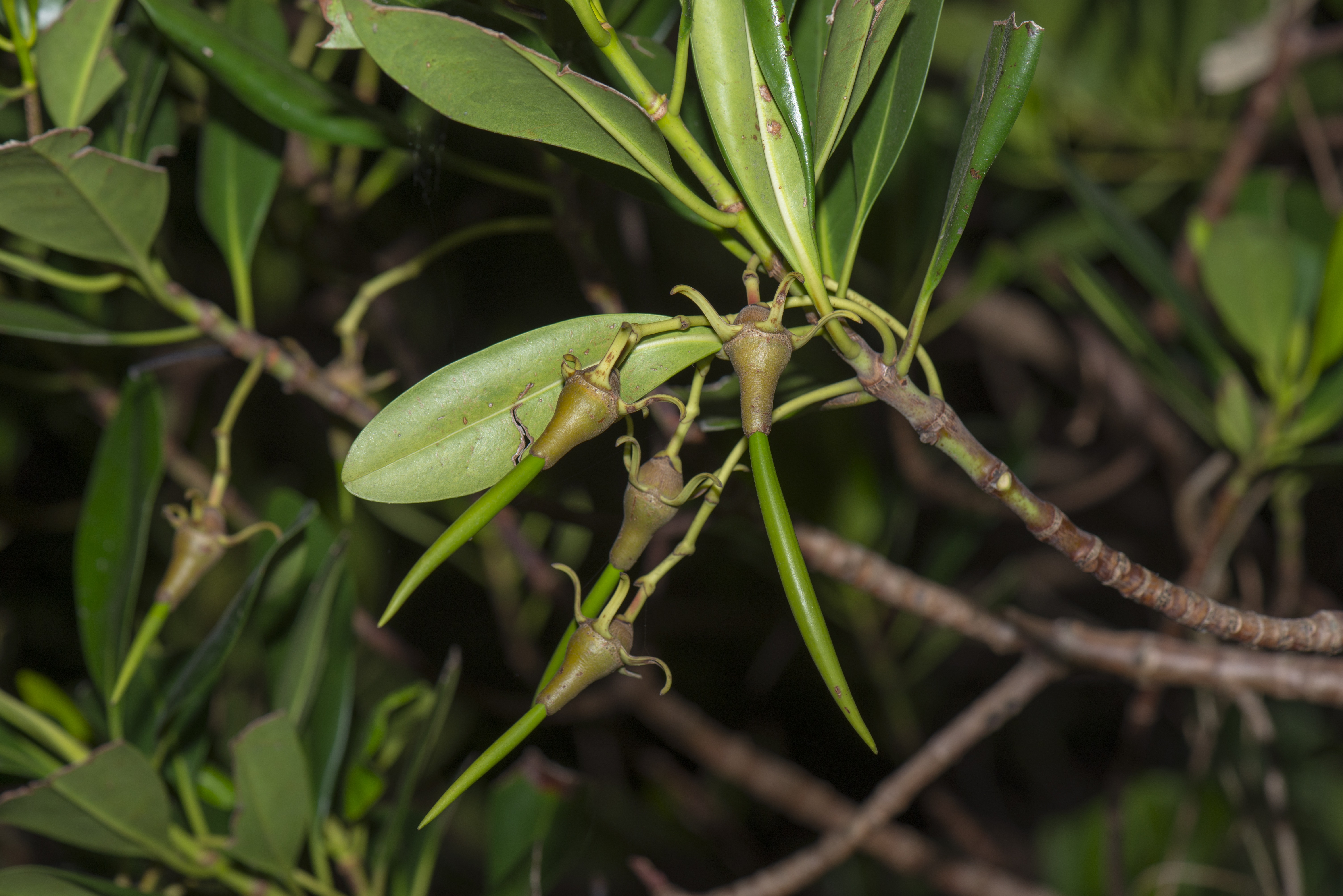 _ESG2787 Kandelia obovata